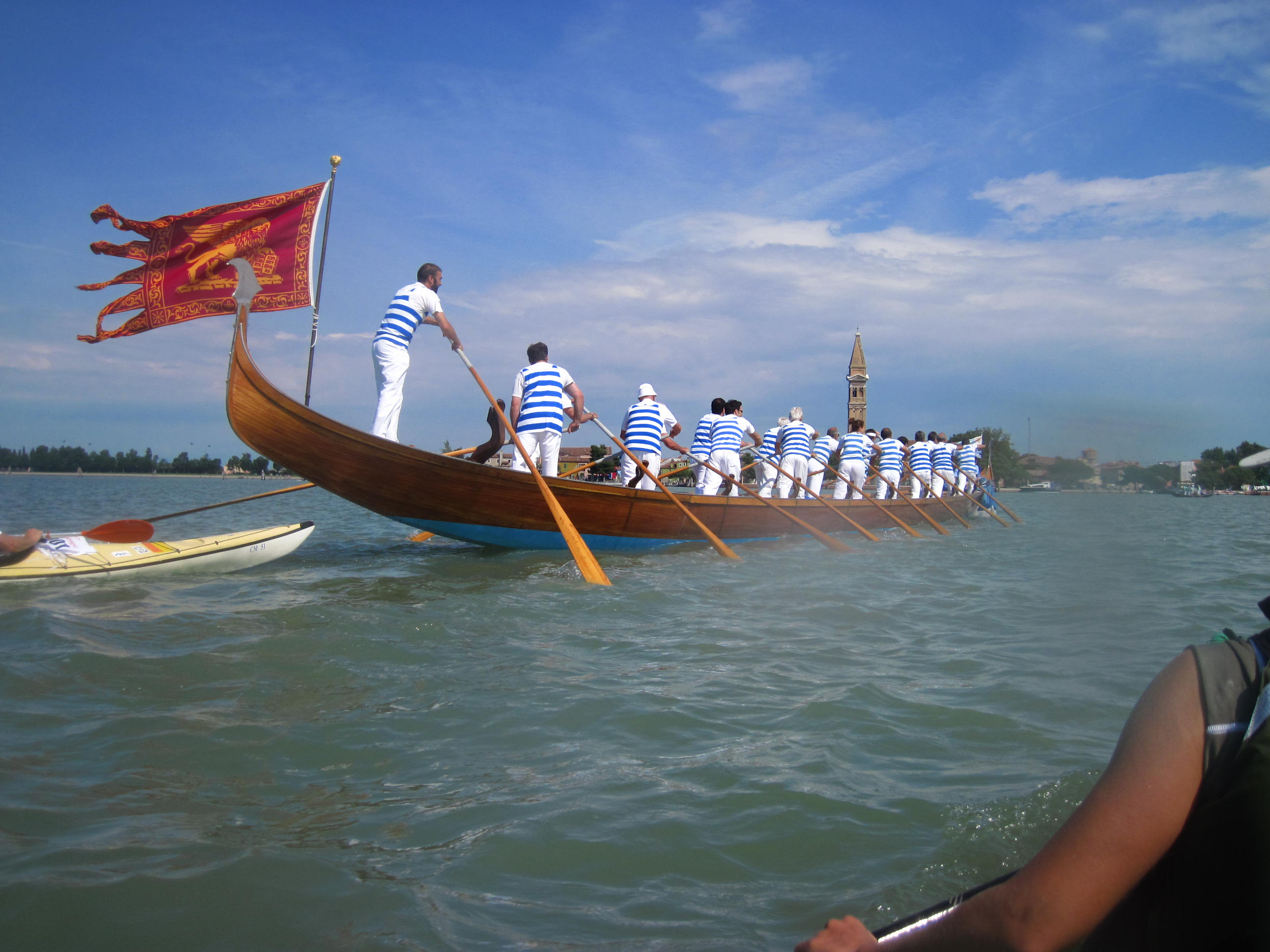 Vogalonga 2011